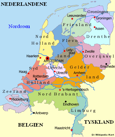 Kort over Nederlandene